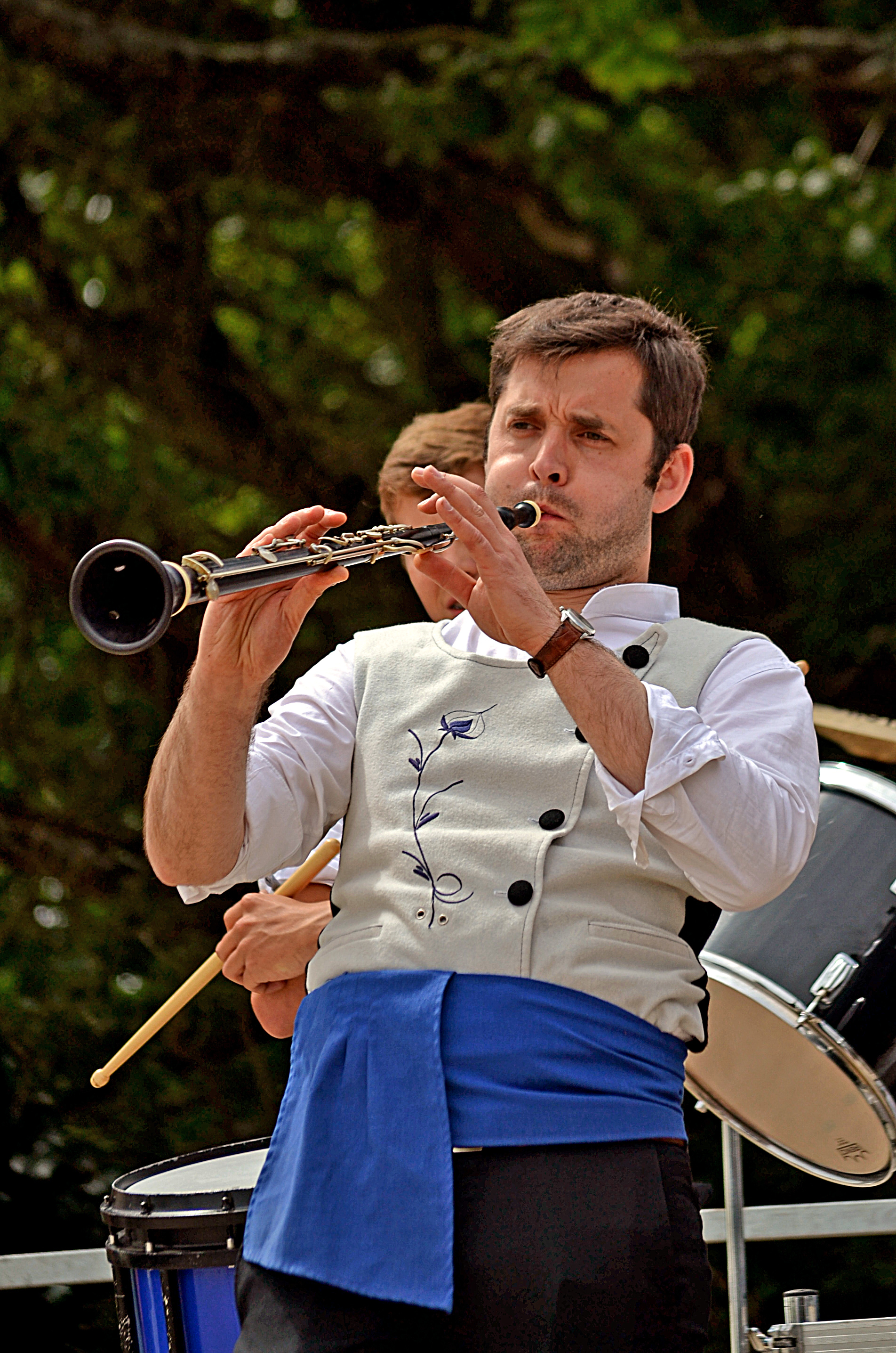 La Kevrenn Kastell au festival Gouel an Eost à Plougoulm le 9 août 2015.